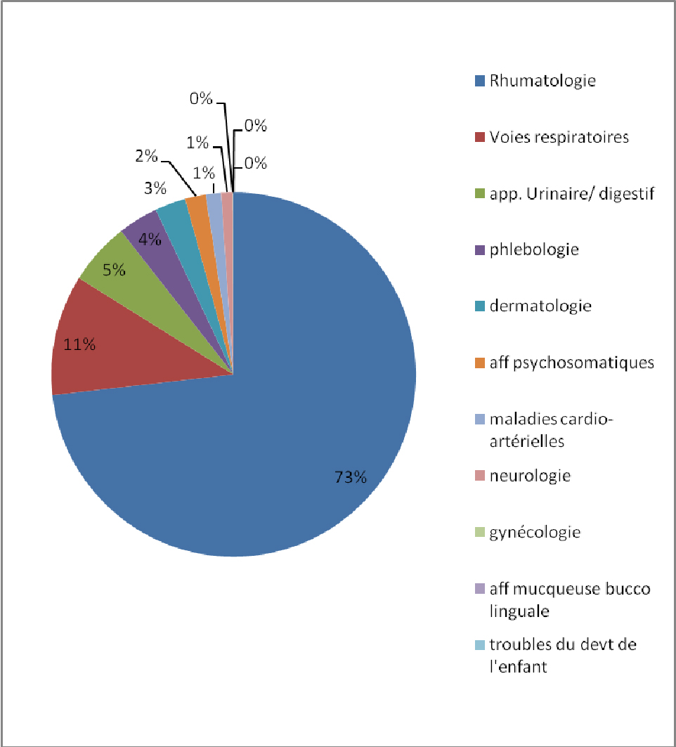 Sources des données : ; Données de 2008